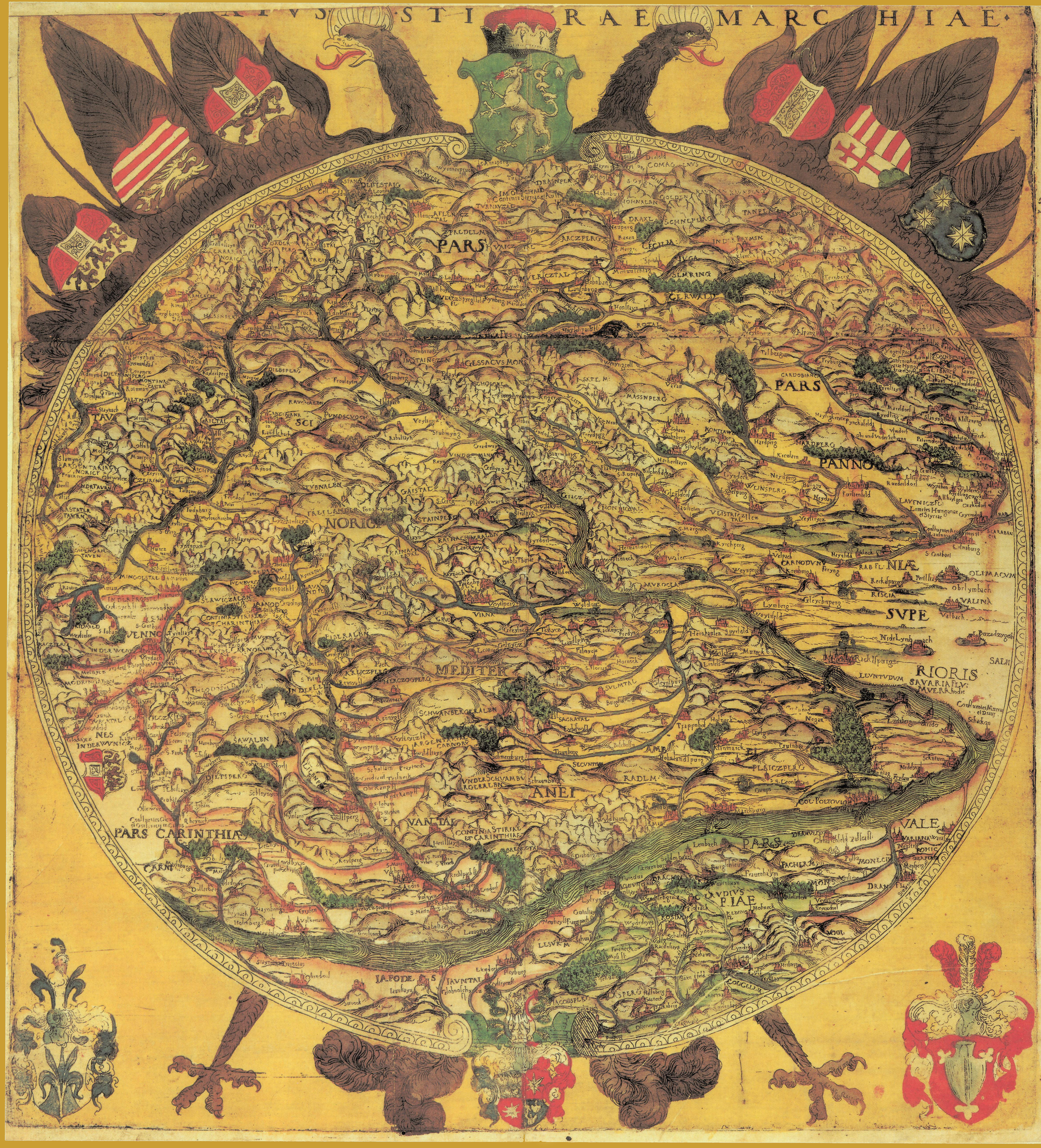 historische Landkarte, 1561: Ducatus Styriae Marchiae. Kreisrunde Karte der Steiermark als Brustschild des Doppeladlers. Älteste und erste ausführliche Karte der Steiermark. Maßstab etwa 1:470.000. Aus: Typi chorographici provinciarum Austriae, Wien 1561. Die Südgrenze an der Save fehlt - das Gebiet um Cilli war erst um 1456 an die Habsburger gefallen und noch nicht vollständig als Teil der Steiermark gesehen. Die vielen Verzerrungen und Unrichtigkeiten sind einerseits auf das für das Gebiet der Steiermark unpassende Kreisformat, andererseits auf den Wissensstand der Kartographie der Zeit zurückzuführen. Dennoch blieb die Karte bis in das 18. Jahrhundert, jedenfalls bis zu thumb|G.M.Vischer: Karte ("Fertilissima") Georg Matthäus Vischer 1678 Vorbild für andere Werke. Quelle: Karl Spreitzhofer: Wolfgang Lazius: Karte der Steiermark "Ducatus Stiriae Marchiae". In: Helfried Valentinisch (Hrsg.): Steiermark Edition. Teil Grenzmark - Herzogtum - Burgenland, Blatt STE01011. Archiv Verlag Wien 1990 ff.